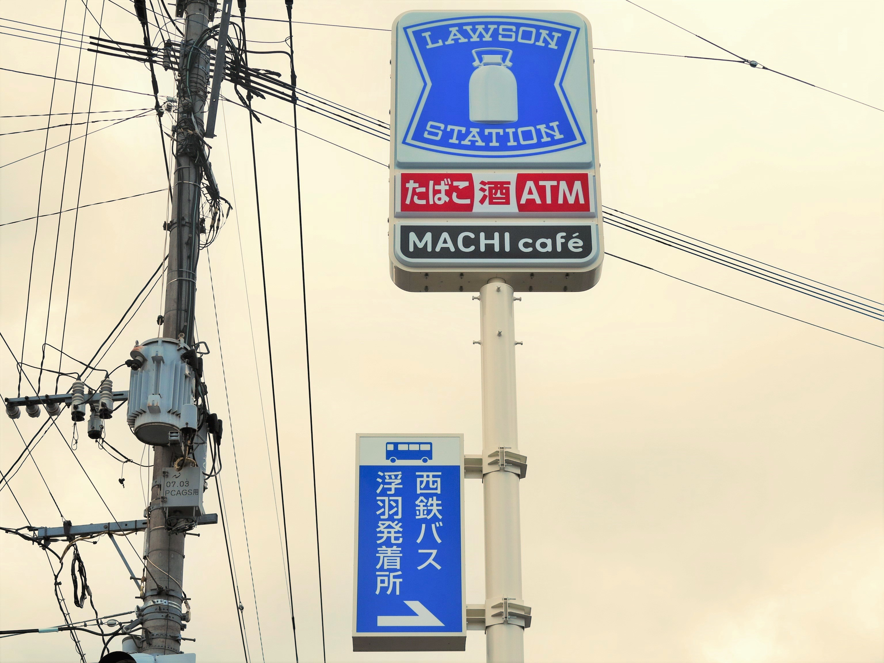 ローソン西鉄バス浮羽発着所店の店舗看板